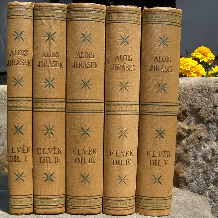 F.L.Věk - vazba - hřbet